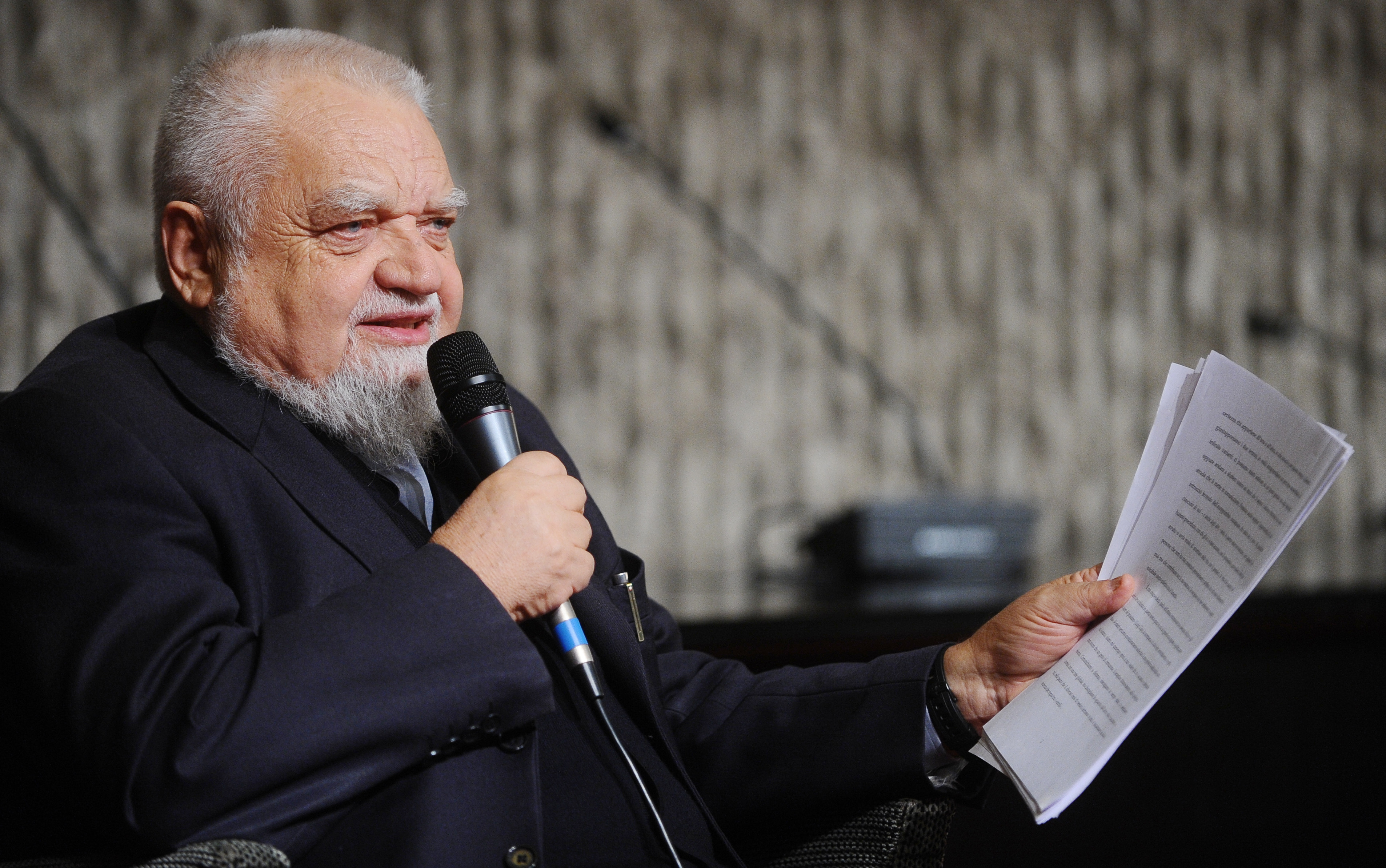 Il priore della Comunità monastica di Bose Enzo Bianchi alla sala della Cooperazione a Trento per una serata organizzata da Alberto Pacher in conclusione del suo impegno in politica.